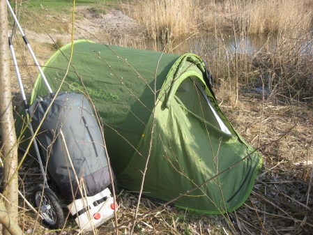 Wurfzelt (2 Sec 1) von Quechua mit Innenzelt u. selbst angenähtem Vordach